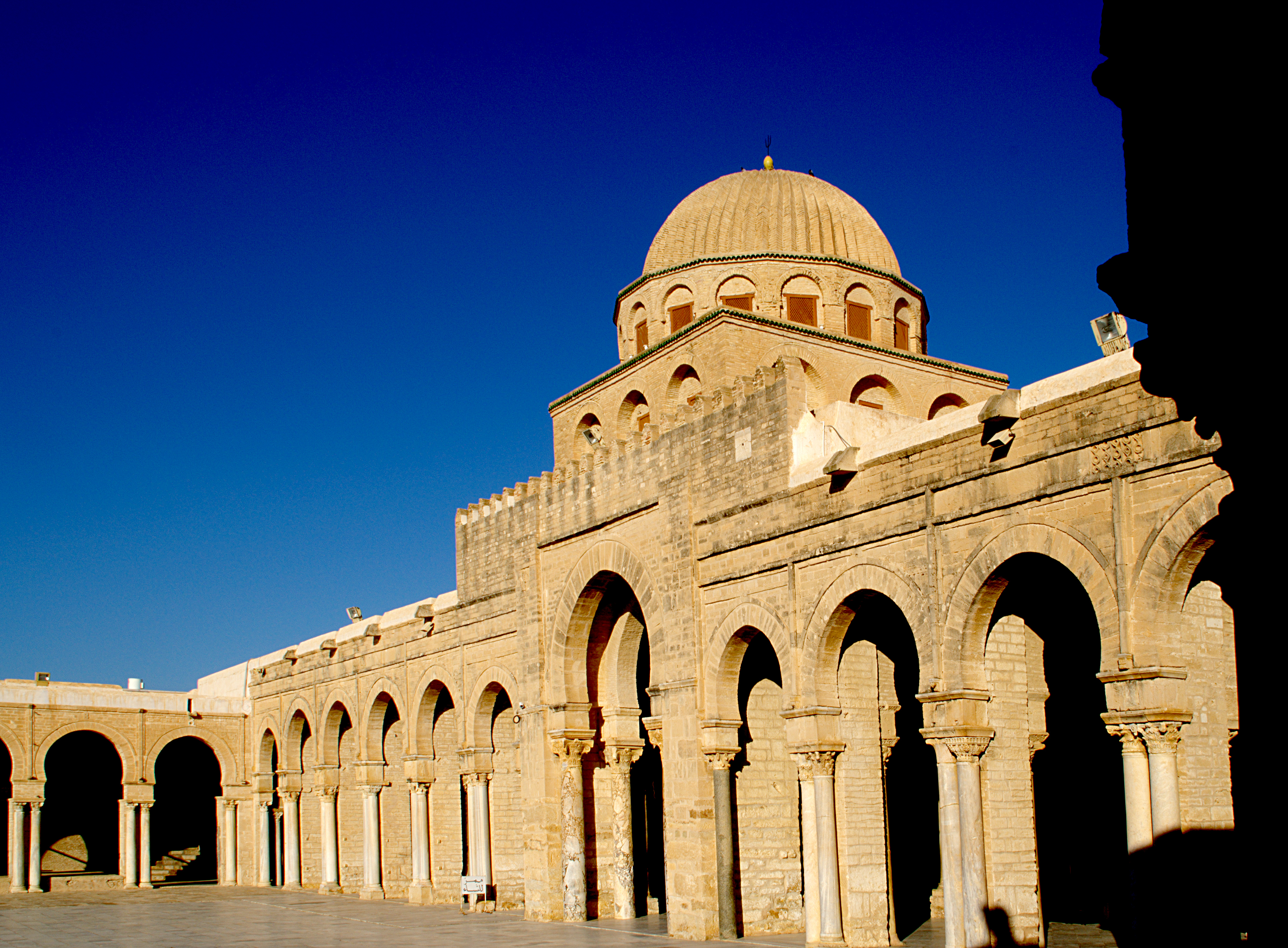 Grande Mosquée (Sidi Okba), Kairouan